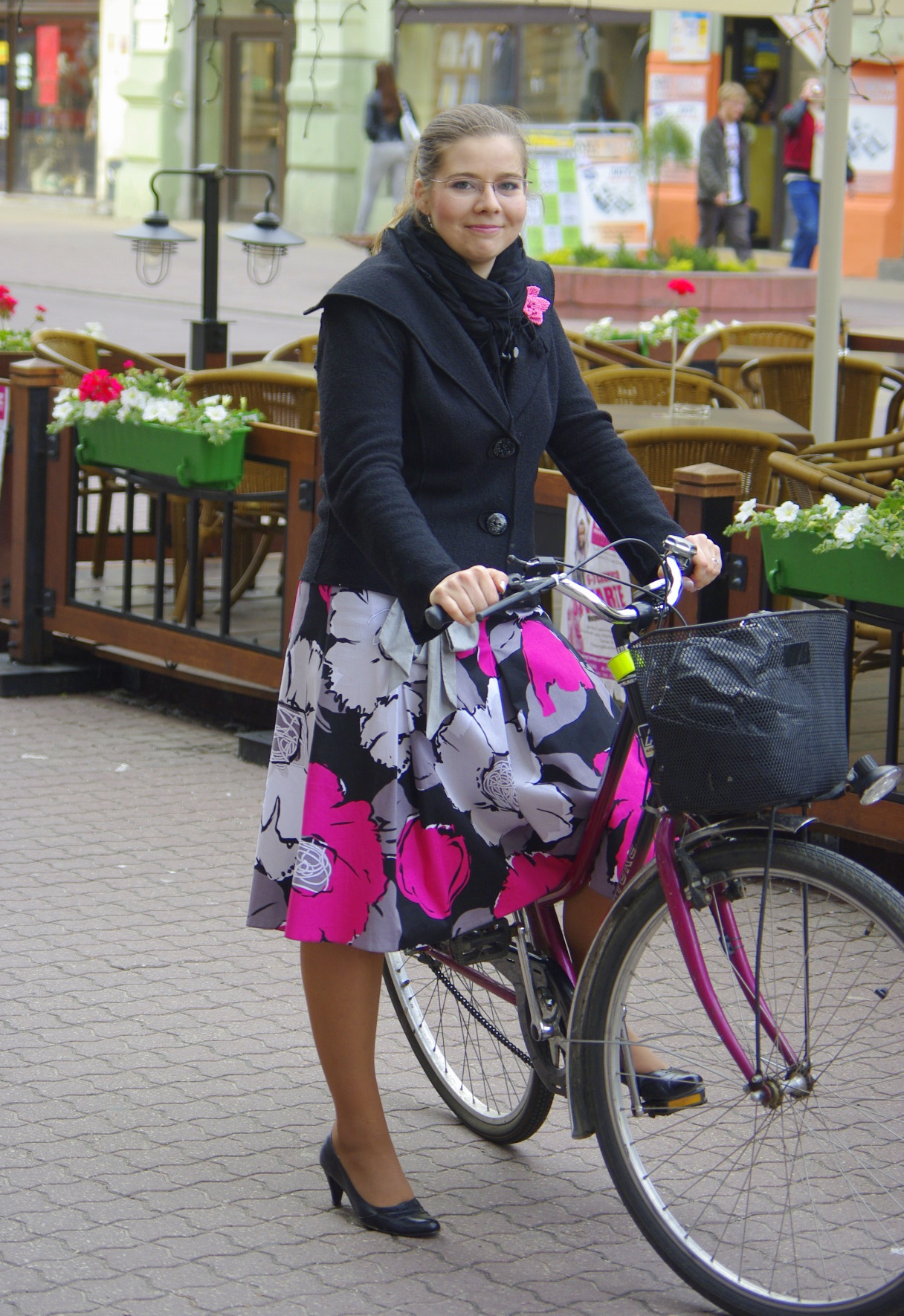 Lady on bike, ulica Piotrkowska in Łódź